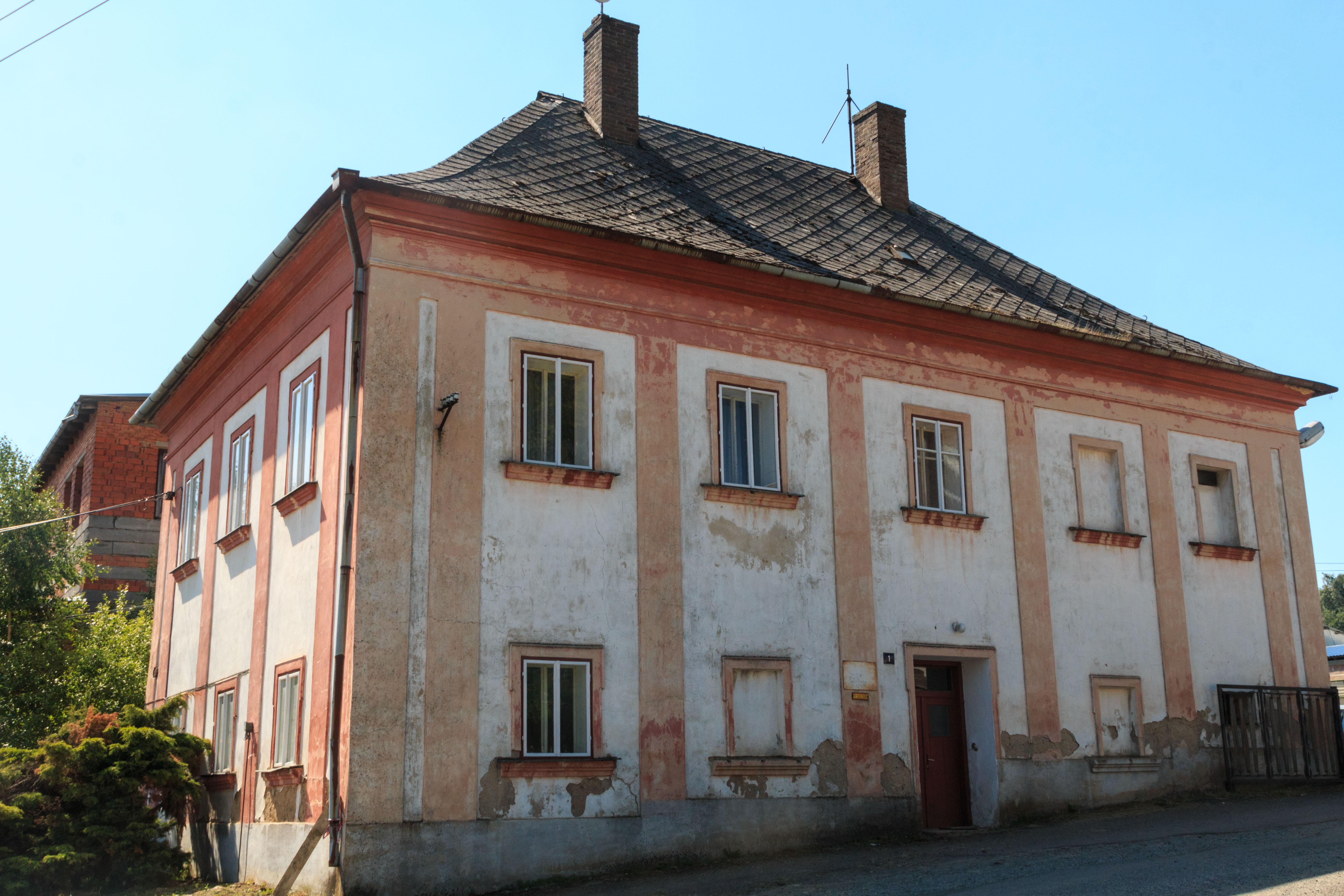 Jedlová - dům čp. 1 Project: Vodstvo.